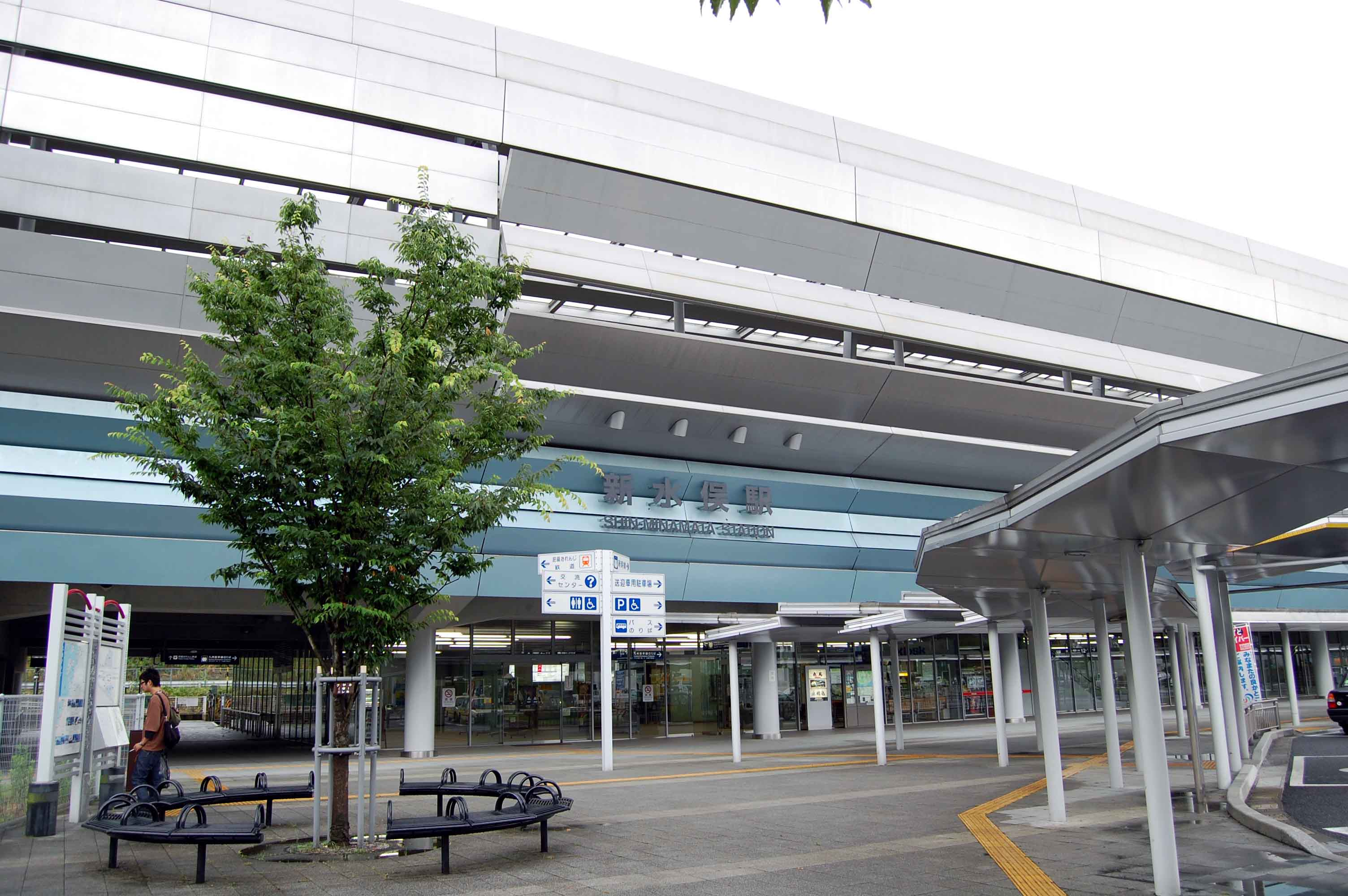 現在の写真があれば差し替えてください。